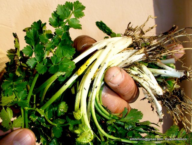 نباتات برّية سورية تؤكل